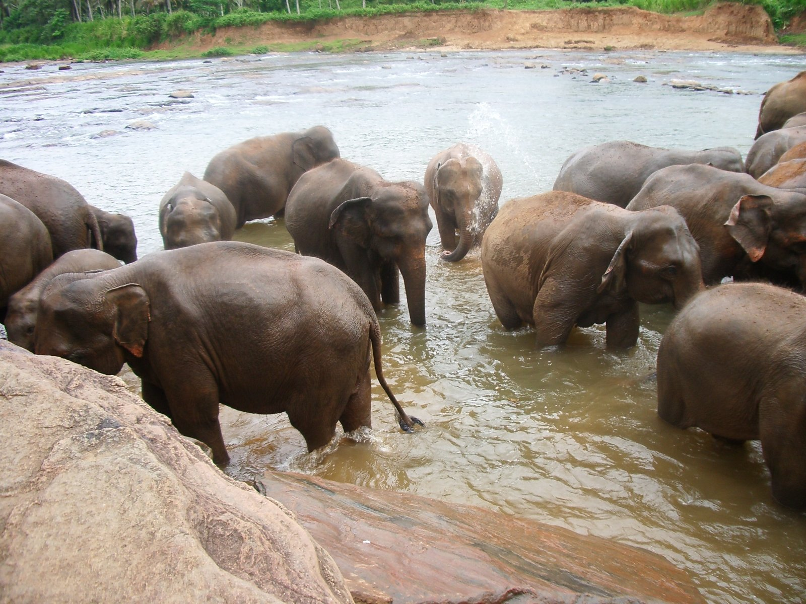 Bany dels elefants a Pinnawela, província Central, Sri Lanka; foto feta per J. Ollé el juliol del 2006